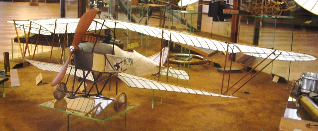 Modell des Lohner-Pfeilfliegers Type B. Modell 1:10.